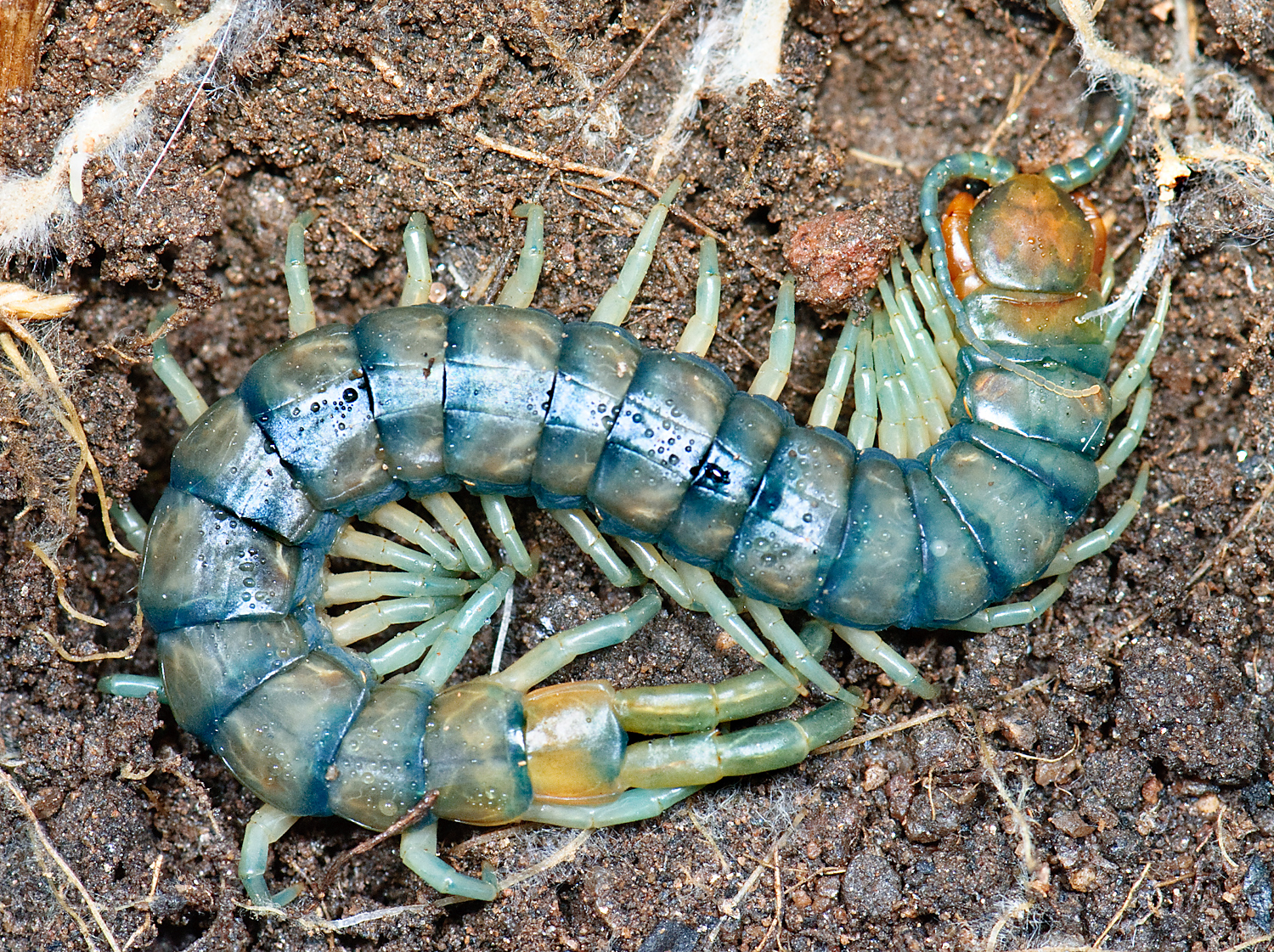 under downed log